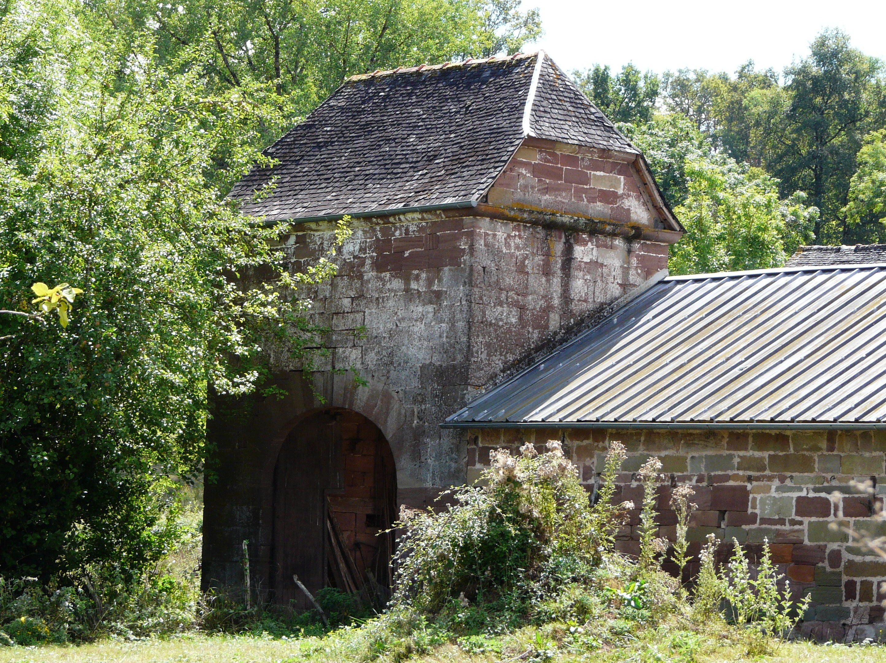 Le pigeonnier-porche du Four, Varetz, France.